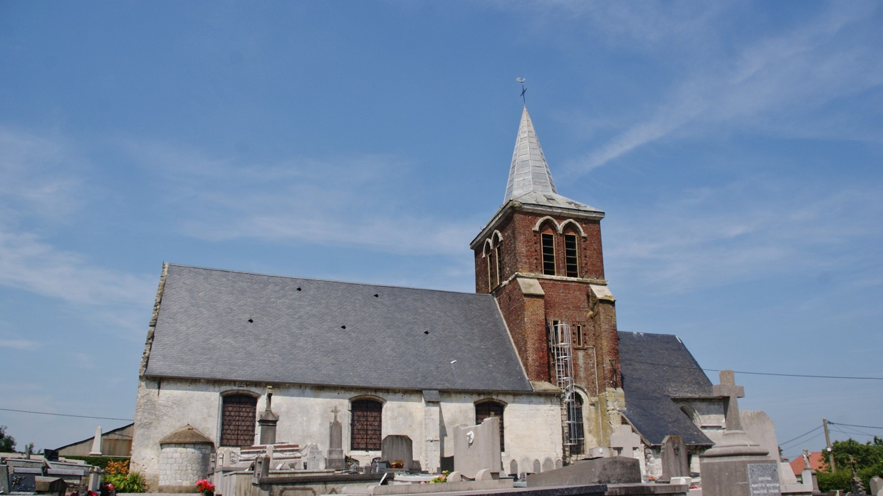 église de style Flamboyant en partie du 12 Em siècle le chœur du 15 Em siècle une nef de 1779 une tour de 1879 et une cloche classée de 1506 appelée Marie